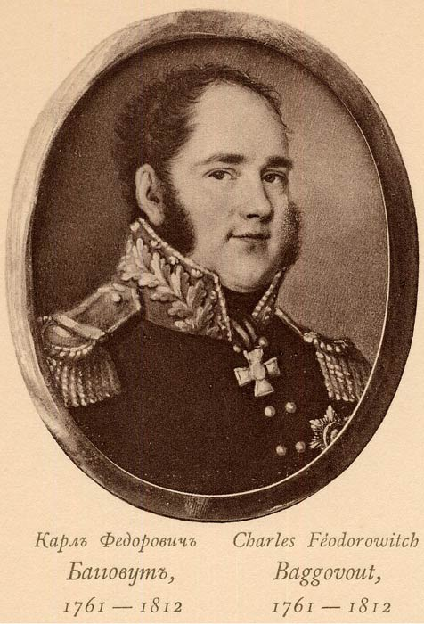 Karl Fedorovich Baggovut, 1761-1812